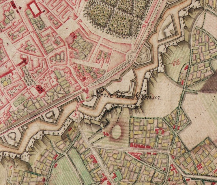 Extrait de la carte de Ferraris n° 76